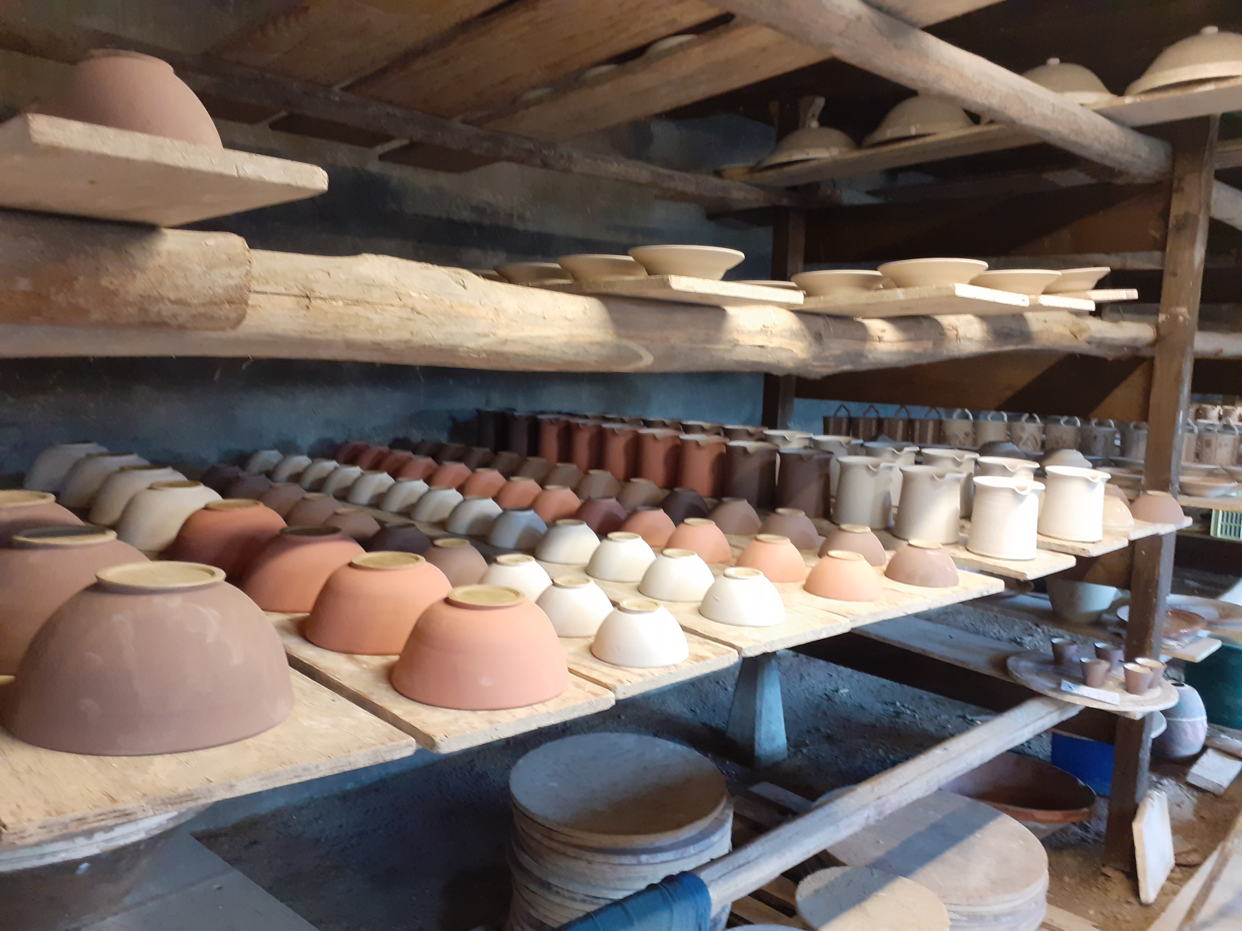 Séchage des pièces de poterie après tournage